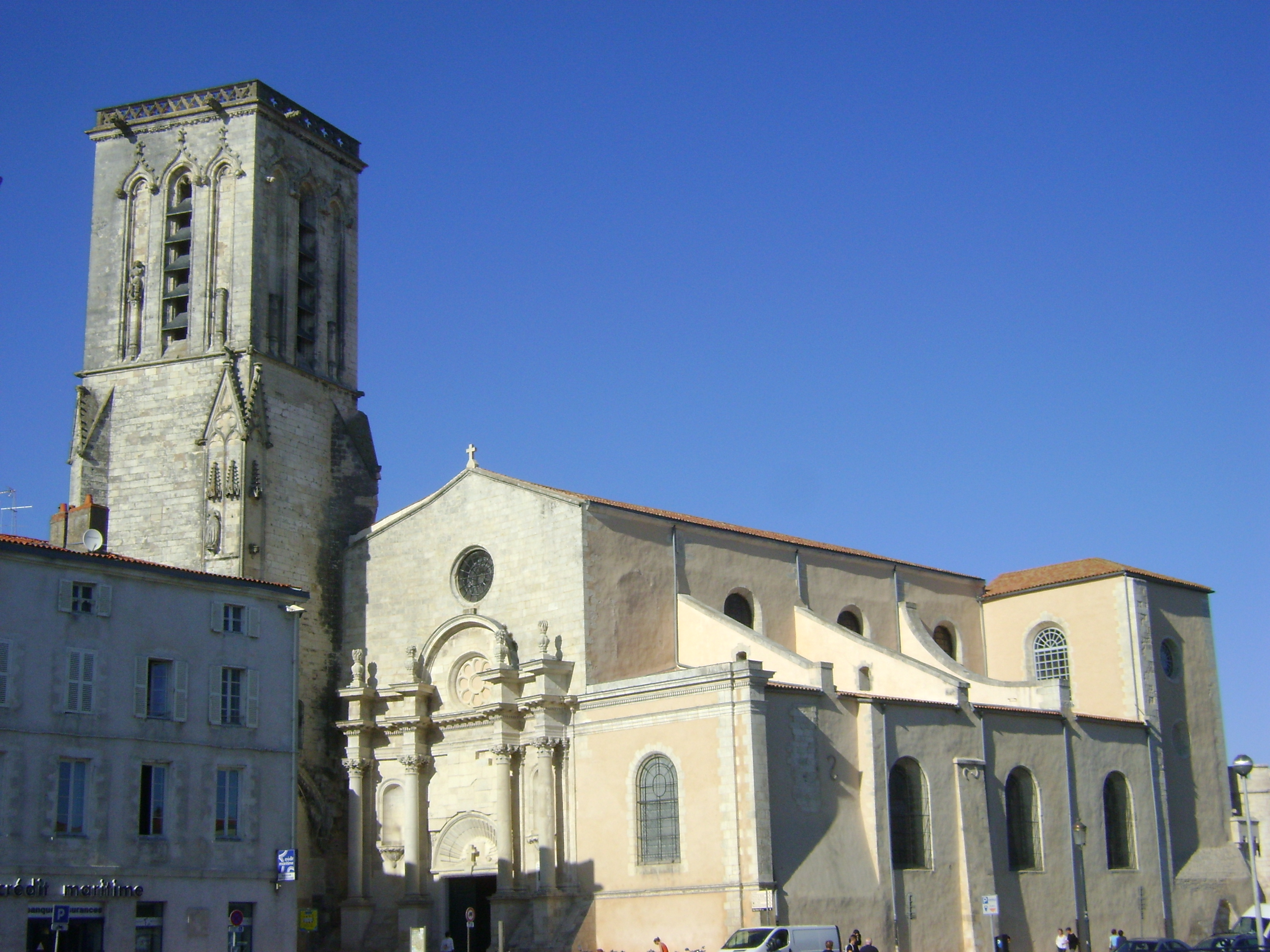 Eglise Saint-Sauveur de la Rochelle.